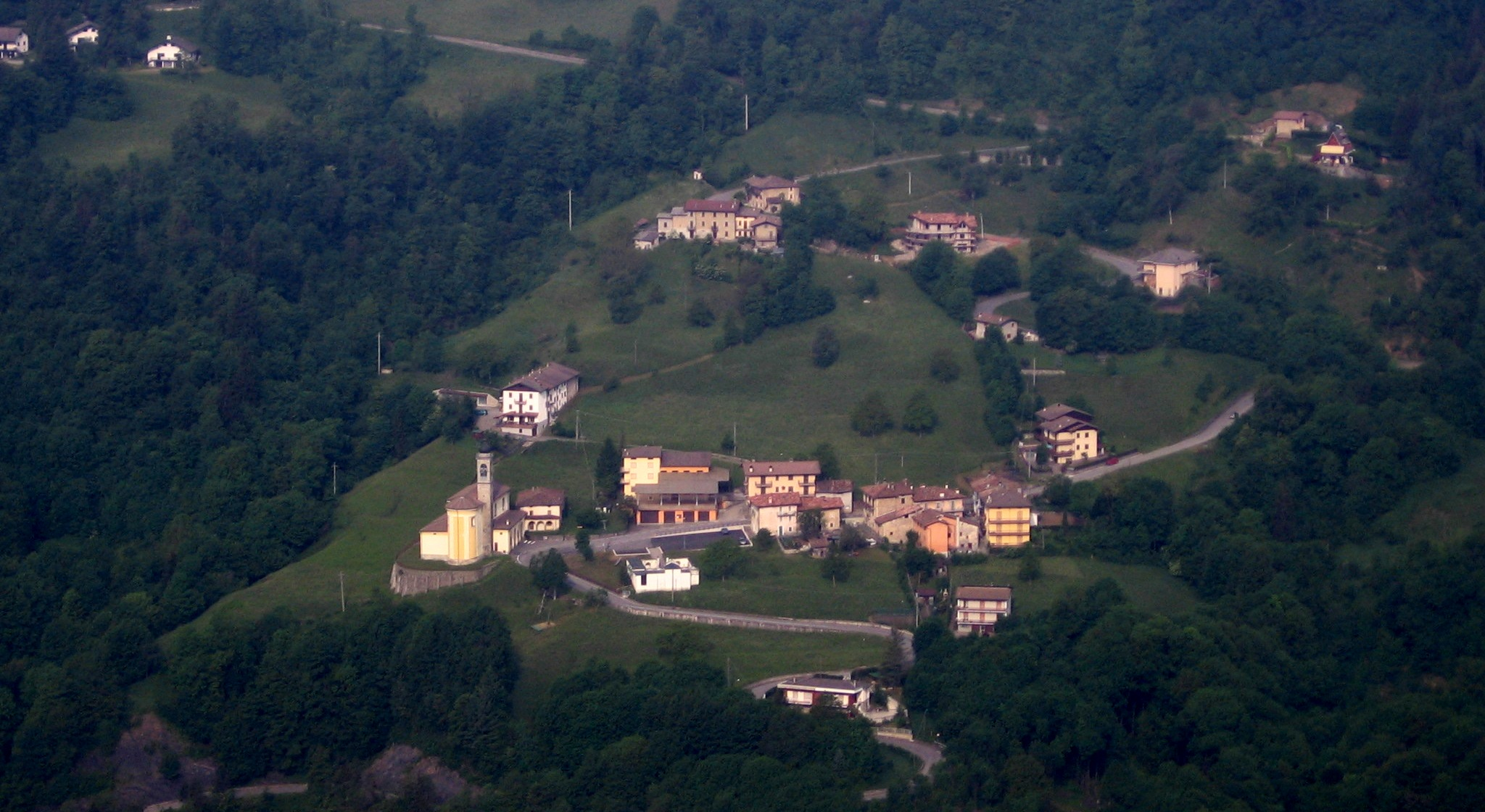 Sambusita frazione di Algua, Bergamo, Italia